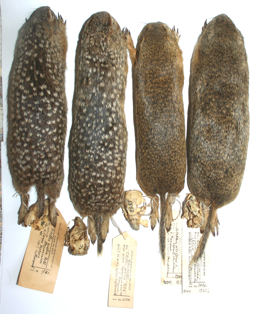 зразки ховрахів з колекції зоомузею Дибовського. етикетовані шкірки з черепами ховрахів з фондів зоомузею ЛНУ